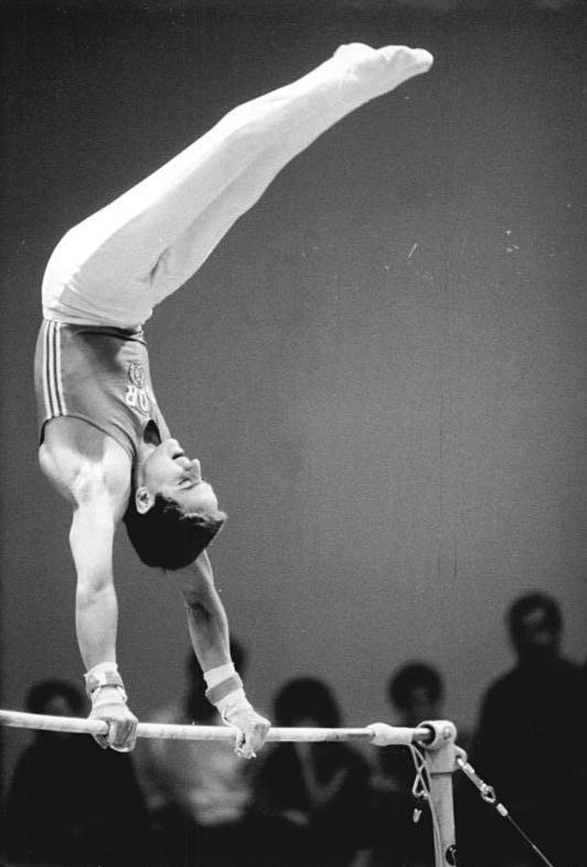 Sven Tippelt ADN-ZB Oberst 25.8.88 Berlin: Kürturnen -Hinter Meister Silvio Kroll und Holger Behrendt wurde der Leipziger Sven Tippelt mit 115,25 Punkten Dritter bei einem Kürsechskampf der DDR-Turner in der Saefkow-Halle. Die Sportler stellten ihre kompletten Programme für die Olympiaentscheidungen in Soul vor.